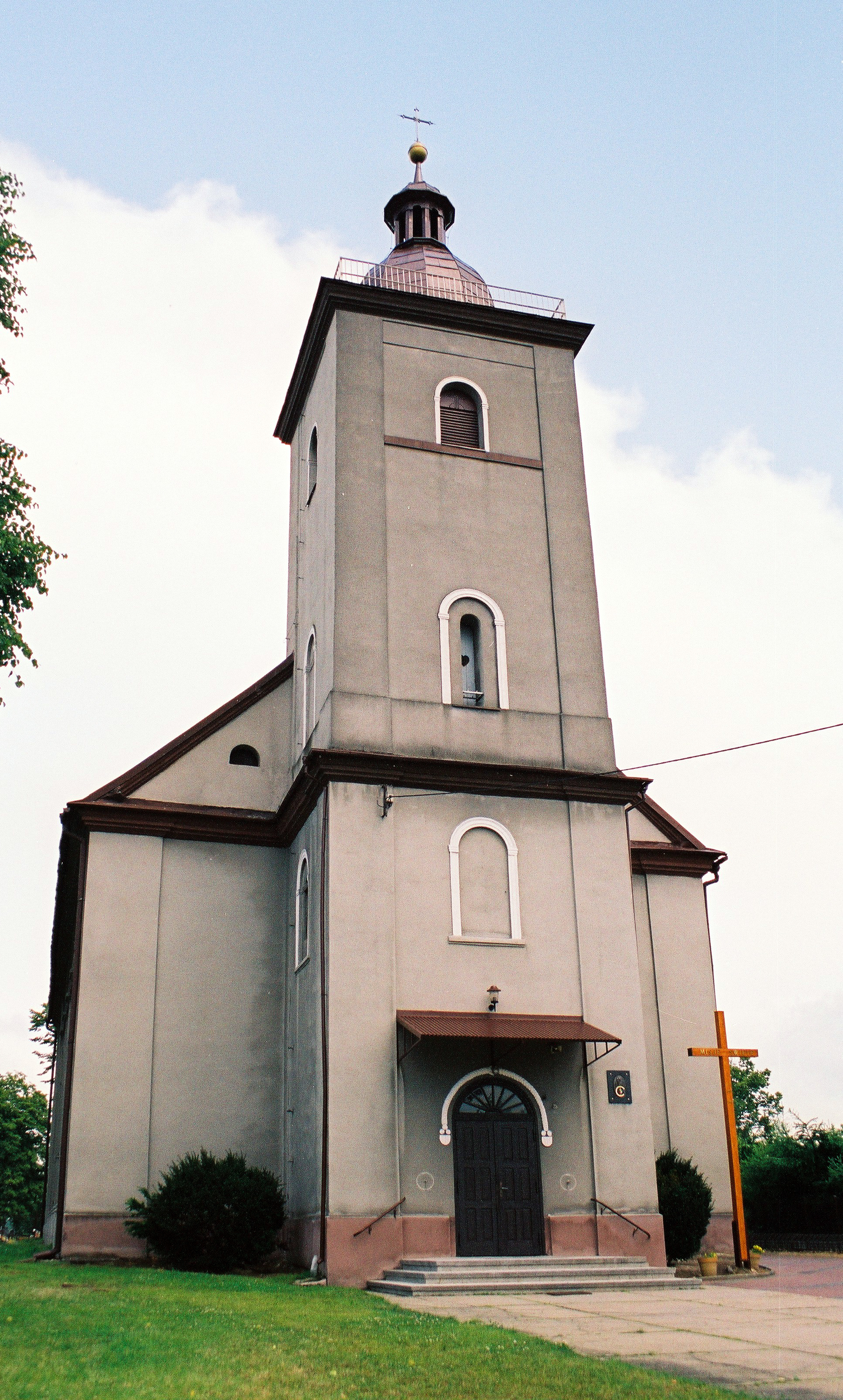 Kościół w Kochanowicach, powiat lublineicki, województwo śląskie